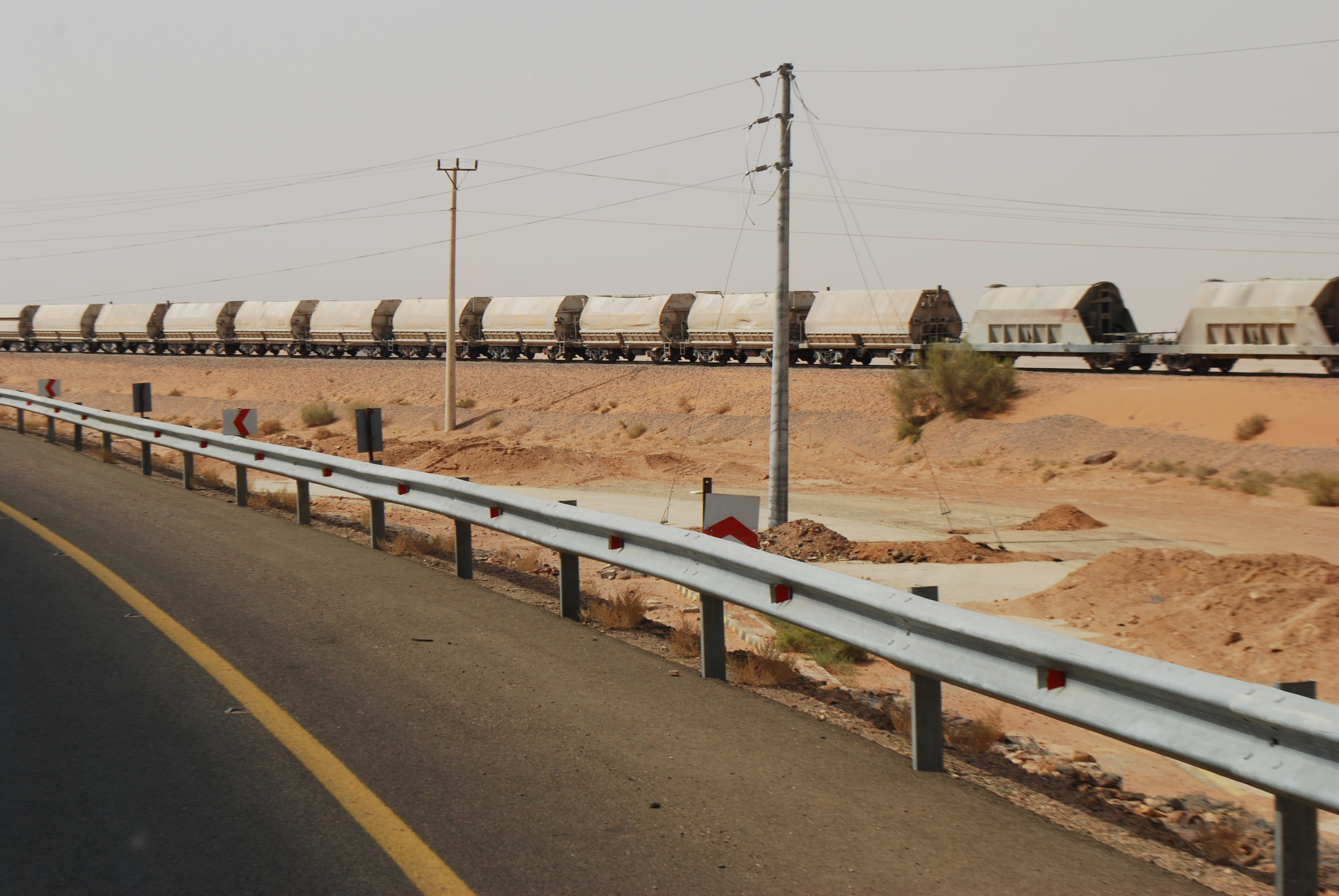 Le transport de phosphate sur le chemin de fer du Hejaz, convoi remontant la voie vers le Nord.